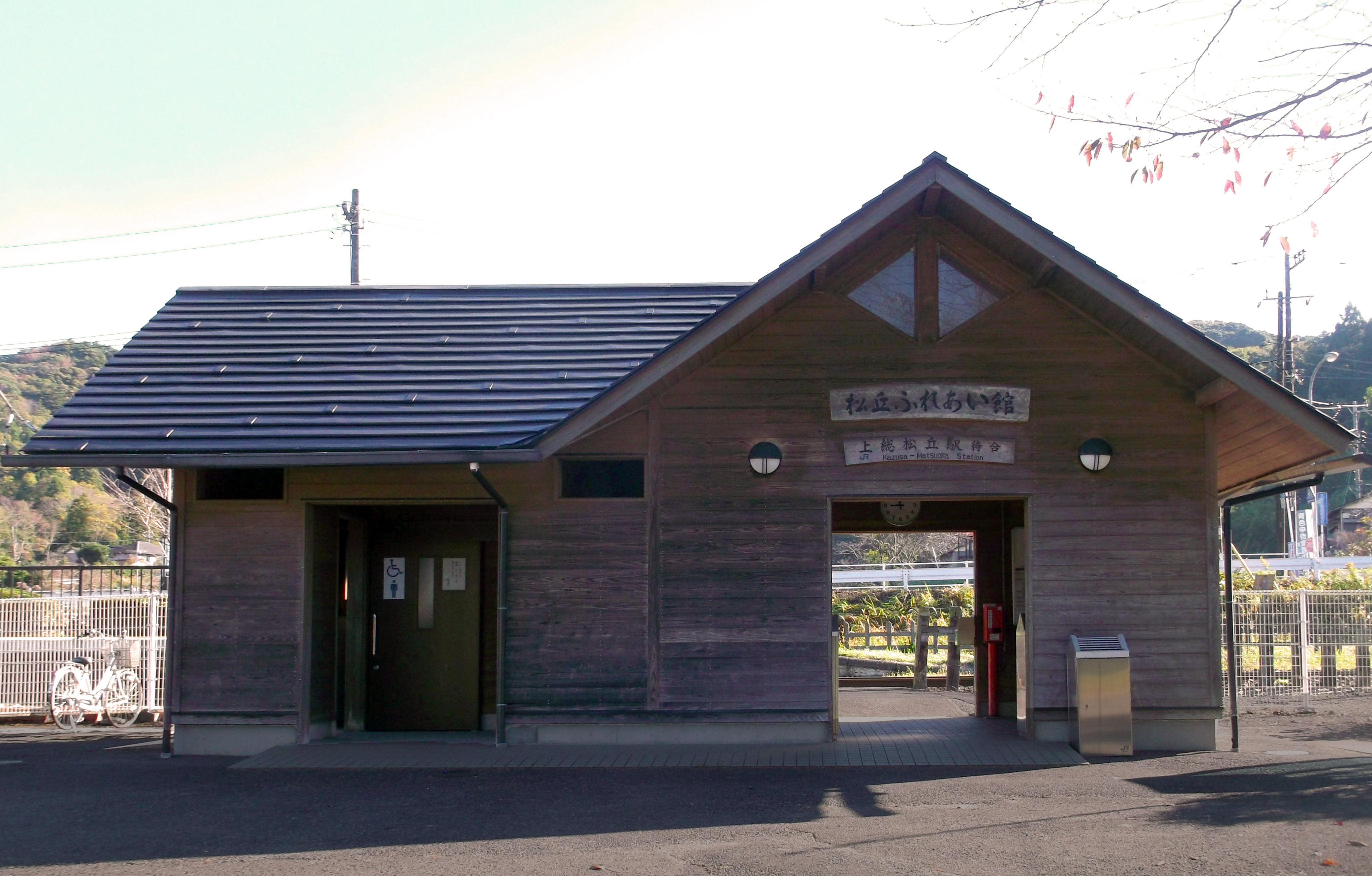 JR久留里線上総松丘駅待合室